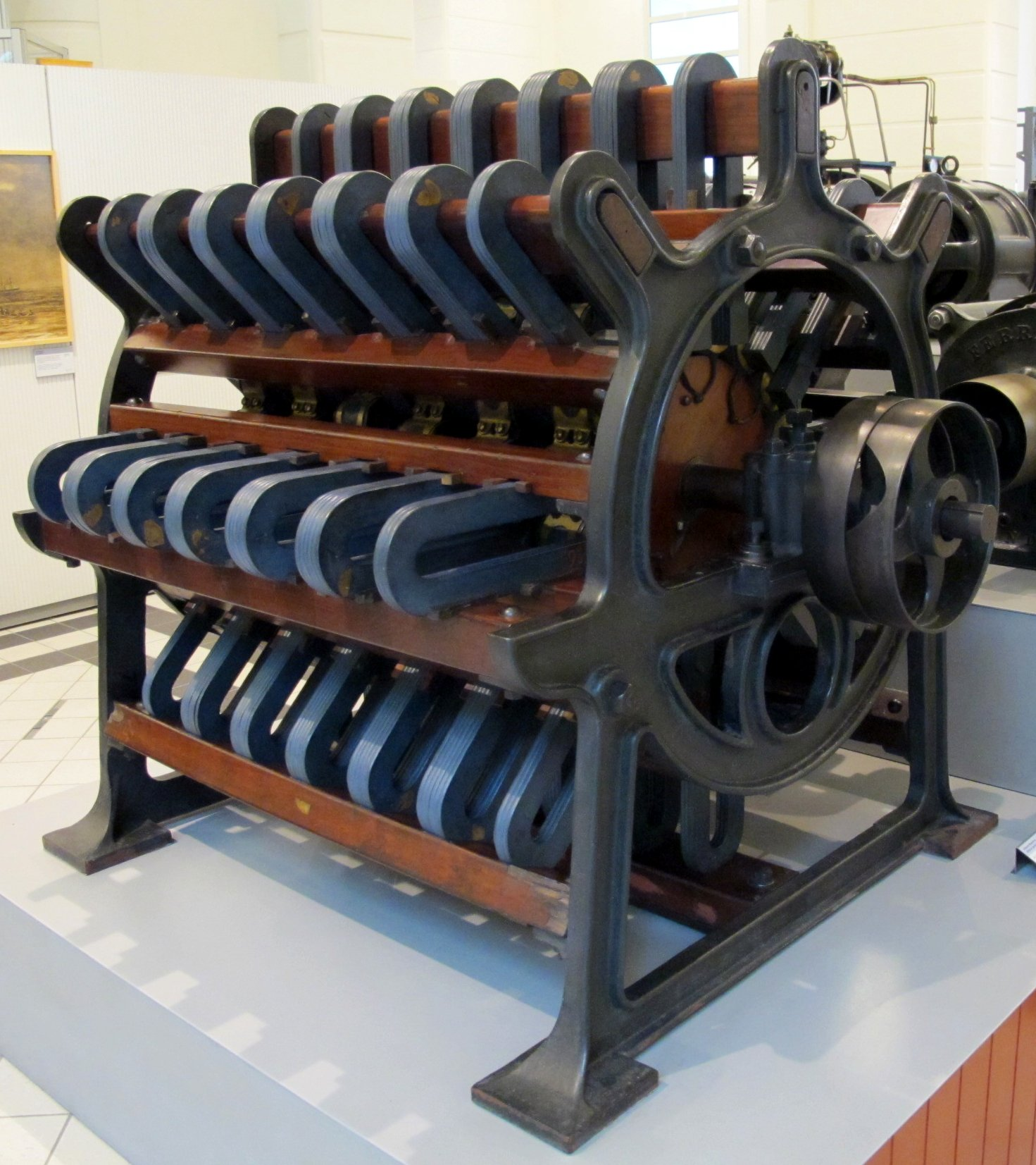 Wechselstromgenerator mit 2 kW bei dem sich die Rotorspulen ein einem Feld von Hufeisenmagneten drehen. Dieser Generator wurde von der k.u.k. Armee zum Betrieb von Bogenlampen eingesetzt. Hersteller: Compagnie L'Alliance Baujahr: ca. 1870